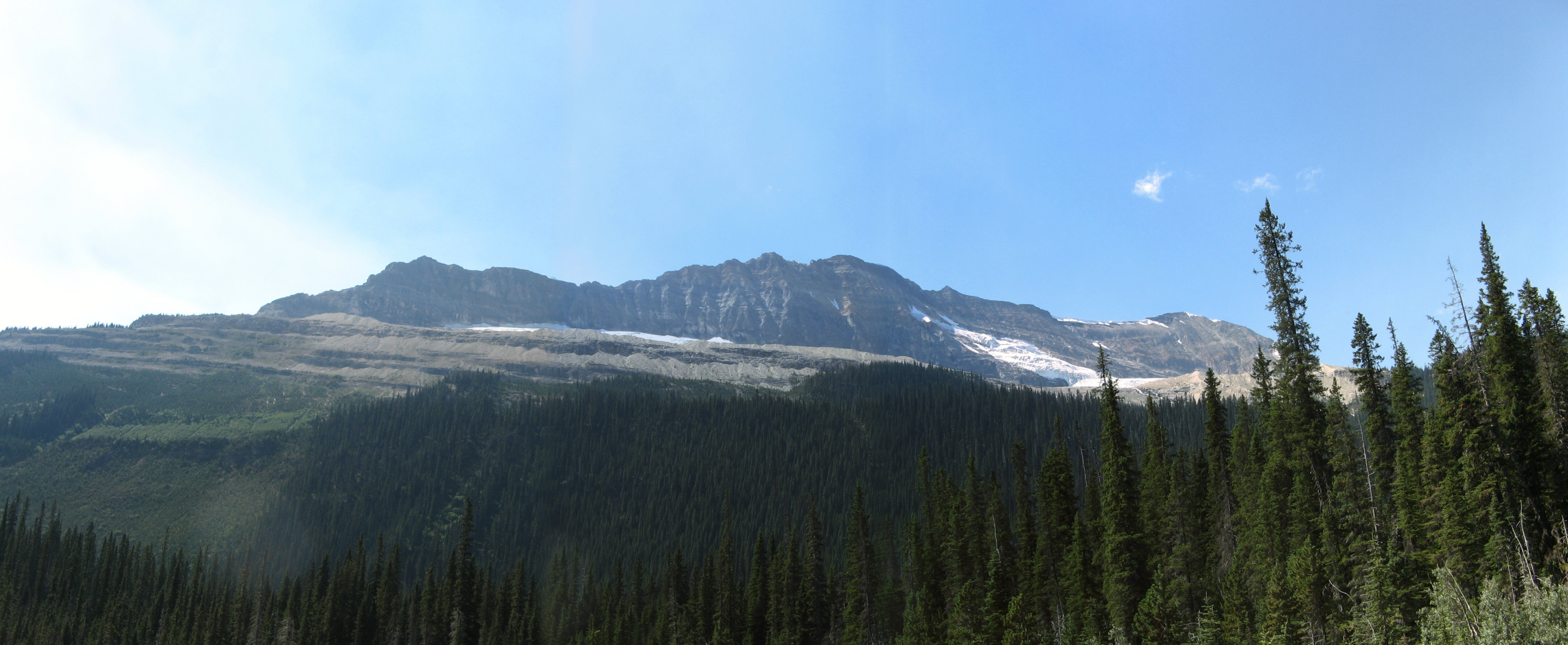 PreisdentrangeBC